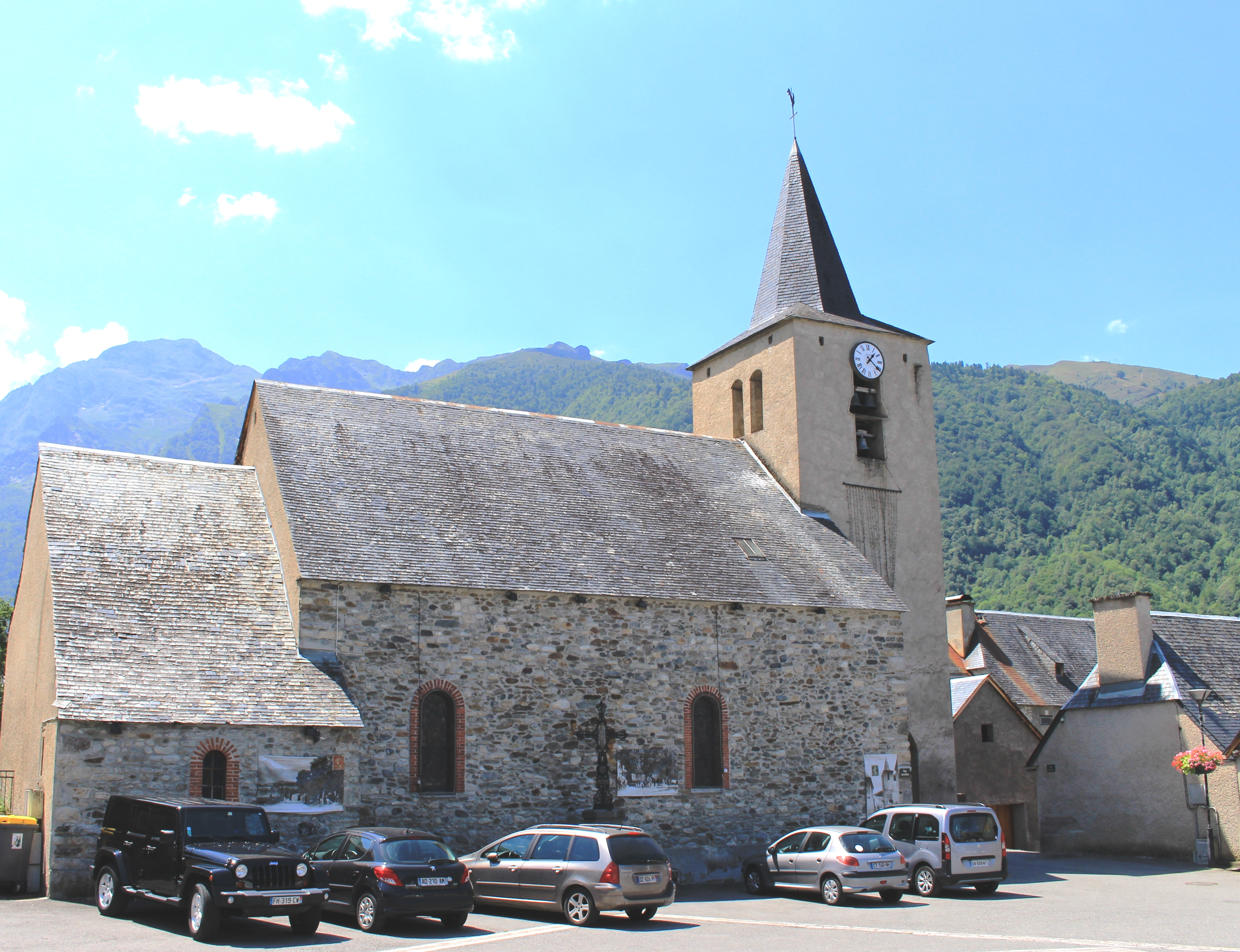 Église Saint-Just et Saint-Pasteur de Loudenvielle (Hautes-Pyrénées)